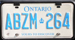 Targa automobilistica canadese dell'Ontario